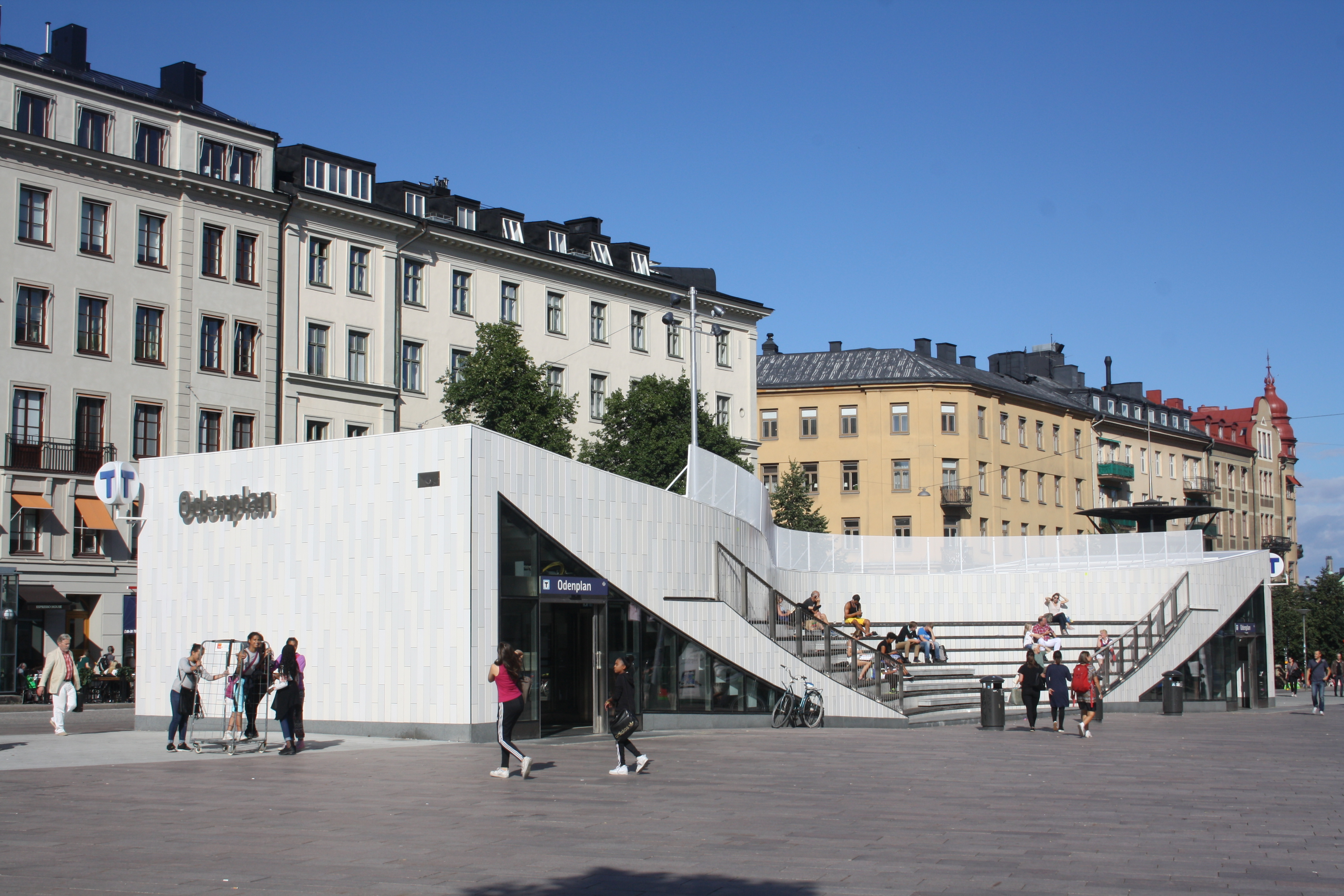 Odenplan augusti 2016